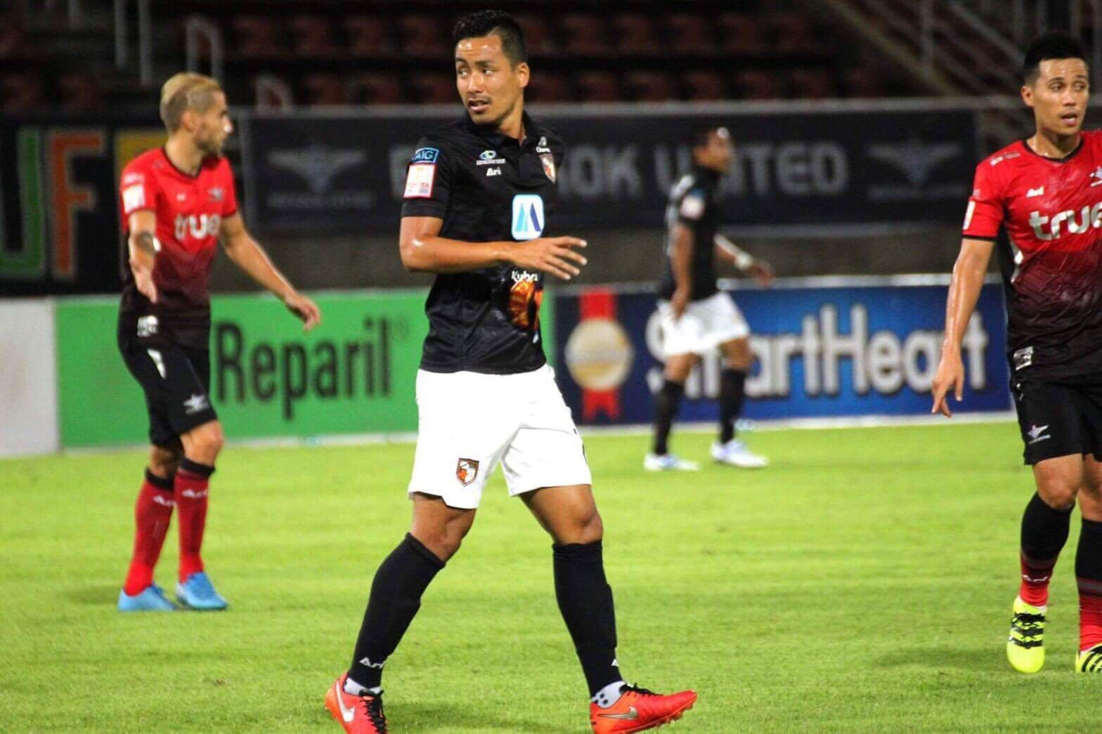 ラチャブリー在籍時